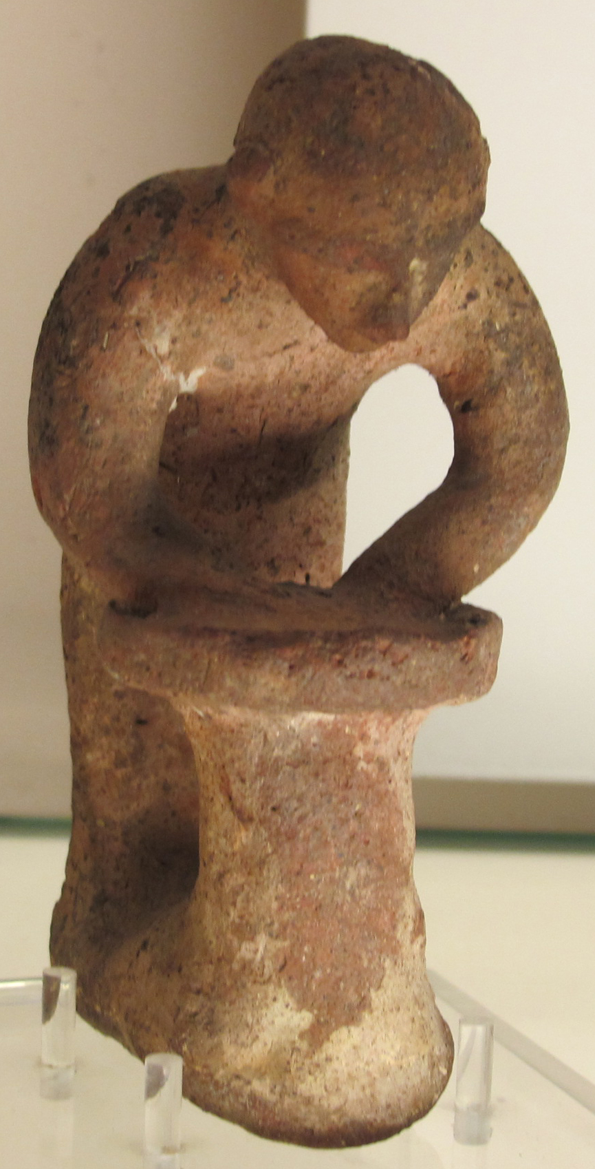 Medma, figurina di una donna che fa il pane, 490ac. ca